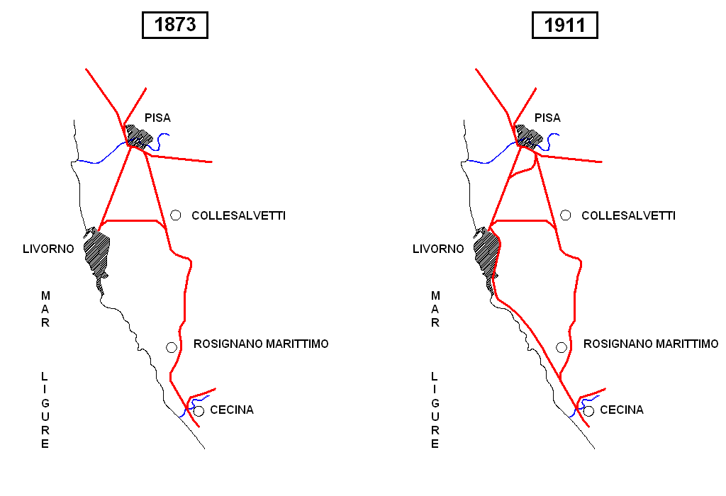 Livorno: evoluzione della linea ferroviaria dal 1873 al 1911.